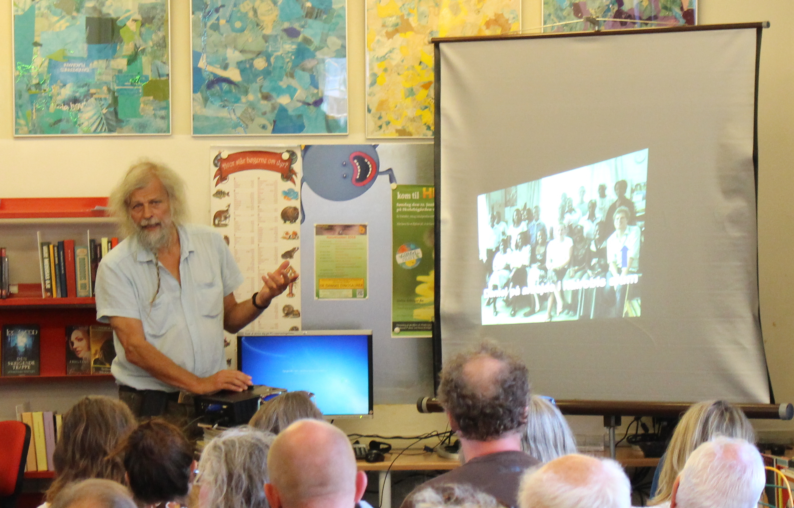 Jacob Holdt på Allinge Bibliotek under Folkemødet 2016